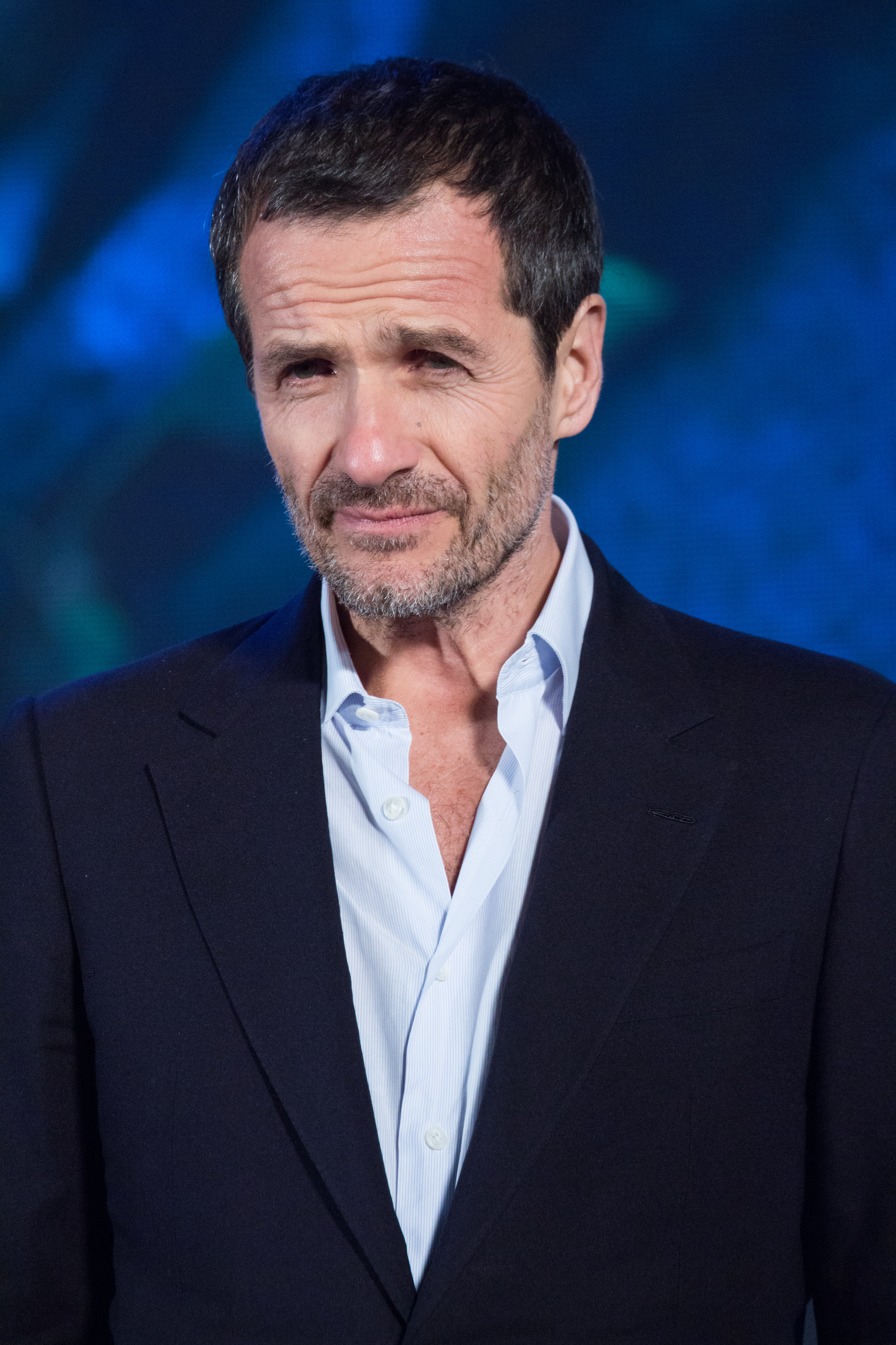 ファンタスティック・ビーストと魔法使いの旅 ジャパン・プレミア レッドカーペット デヴィッド・ハイマン